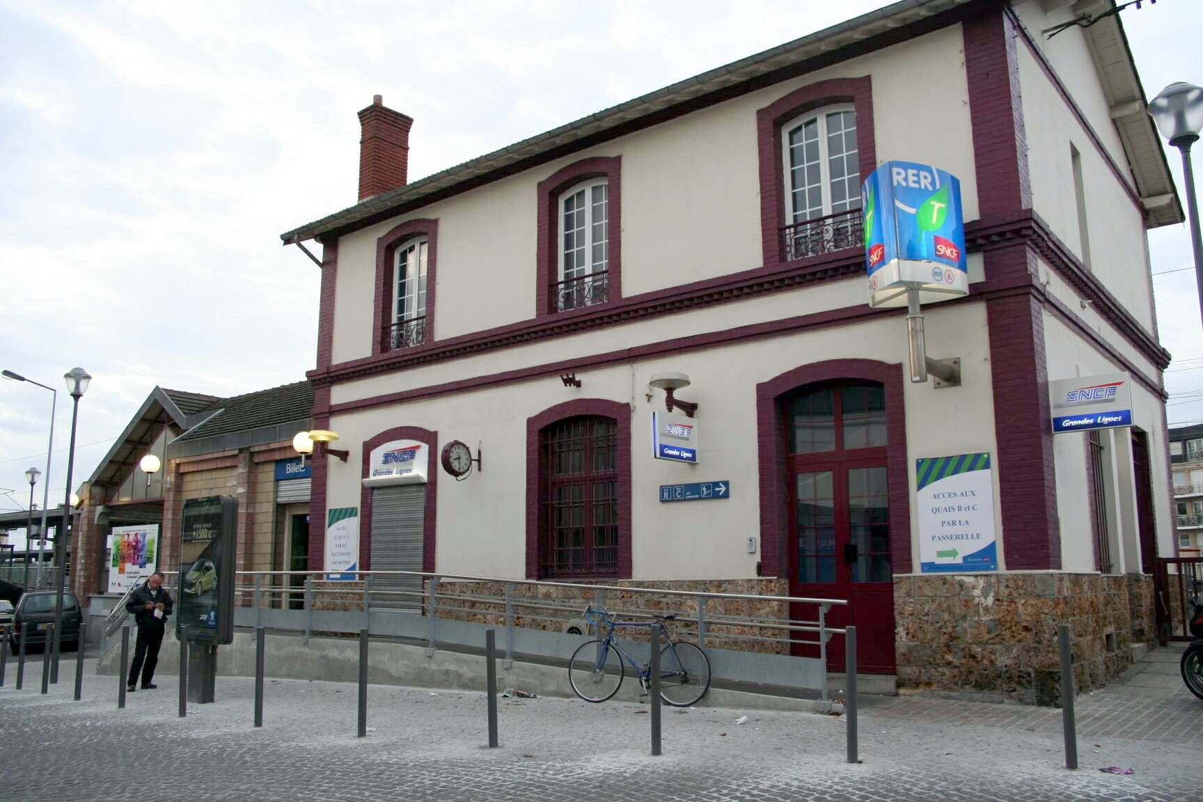 Gare de Houilles - Yvelines (France)